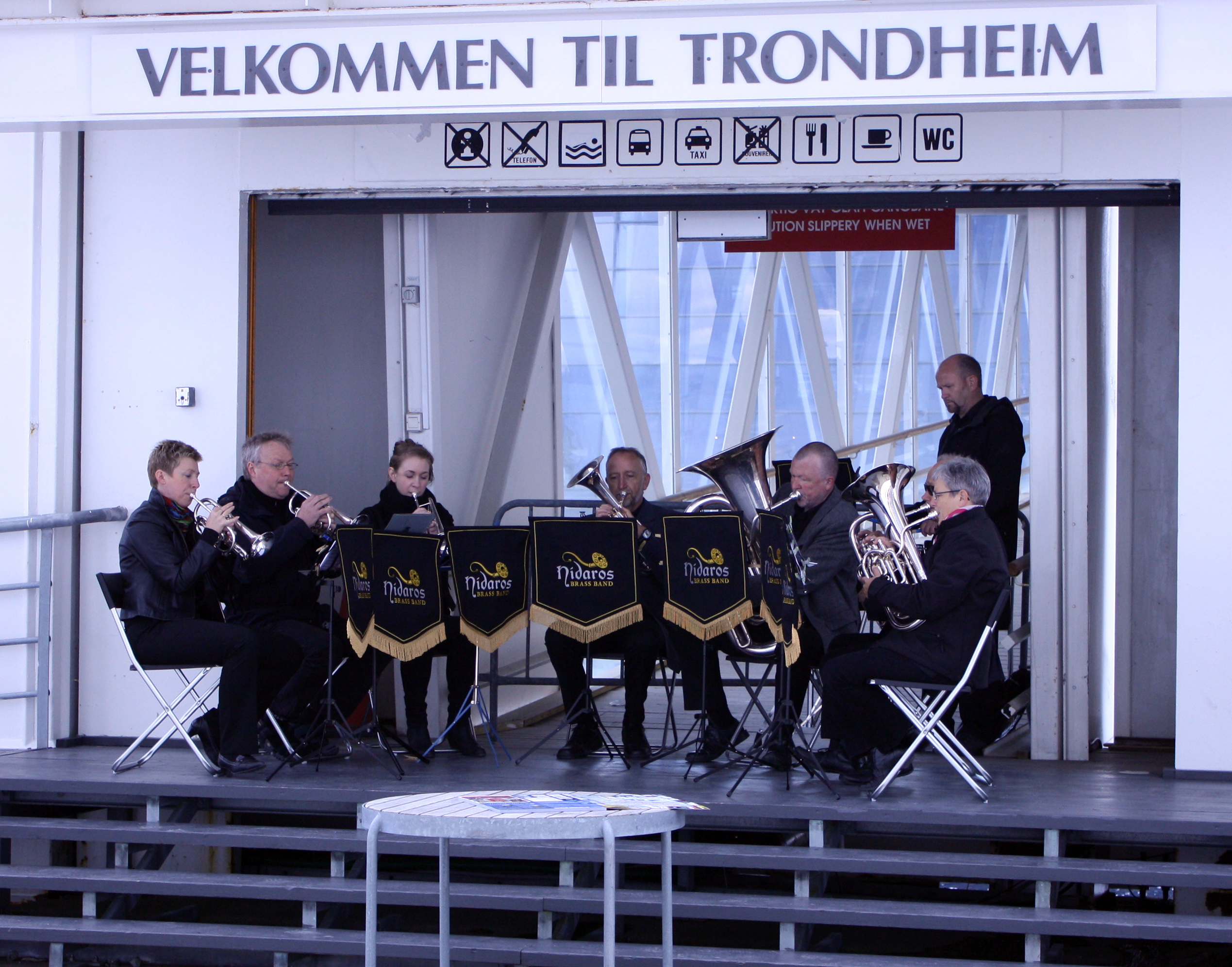 Nidaros Brass Band spilte på kaia, til cruiseturistenes store glede.